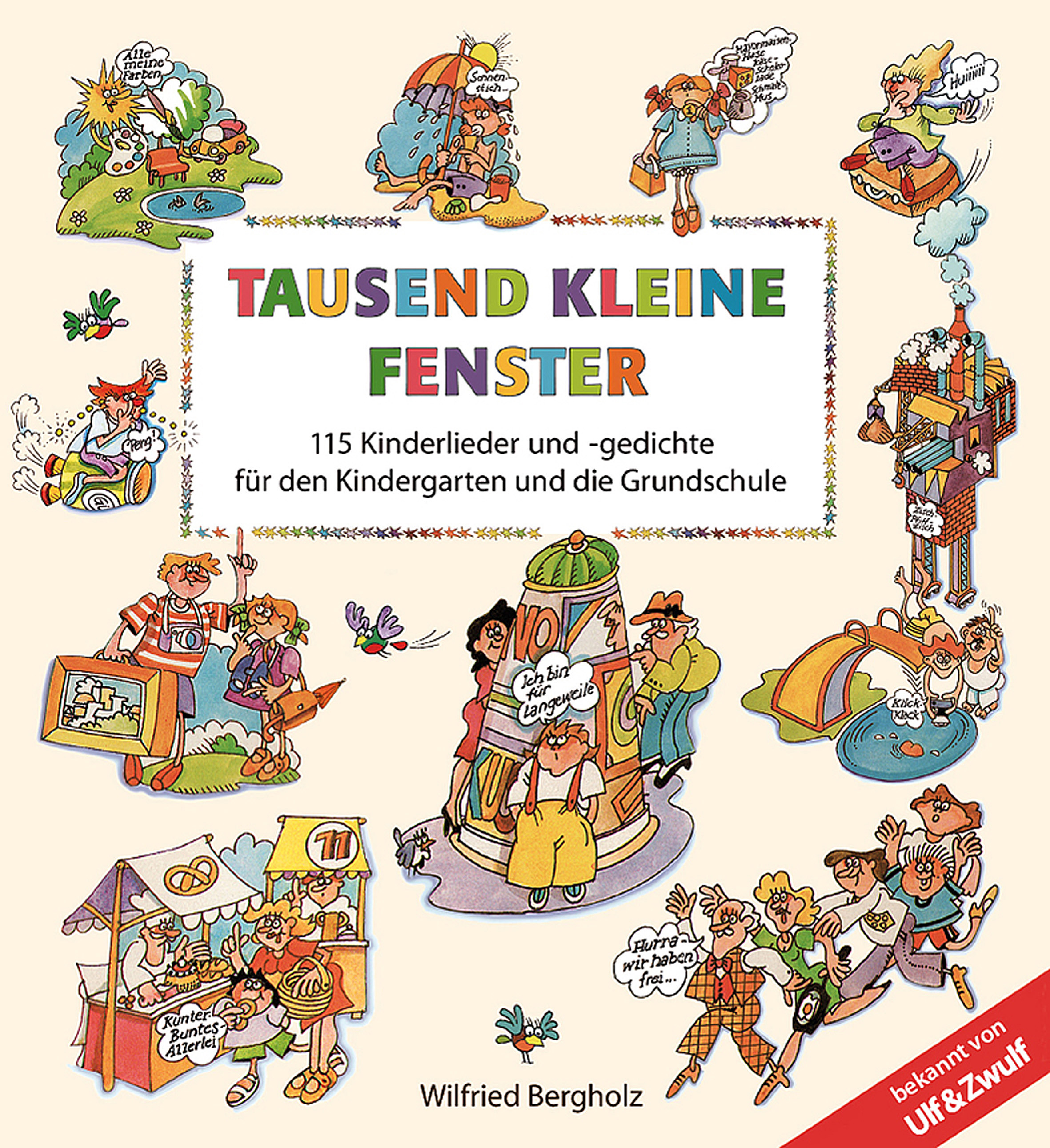 'Tausend kleine Fenster' Kinderlieder und Gedichte, Buchcover und Foto von Wilfried Bergholz